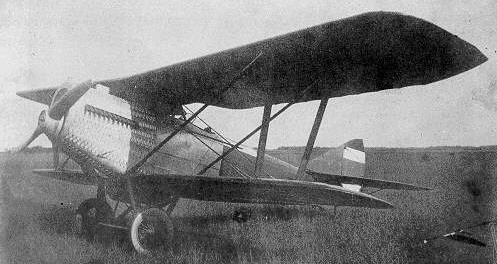 เครื่องบินประชาธิปก